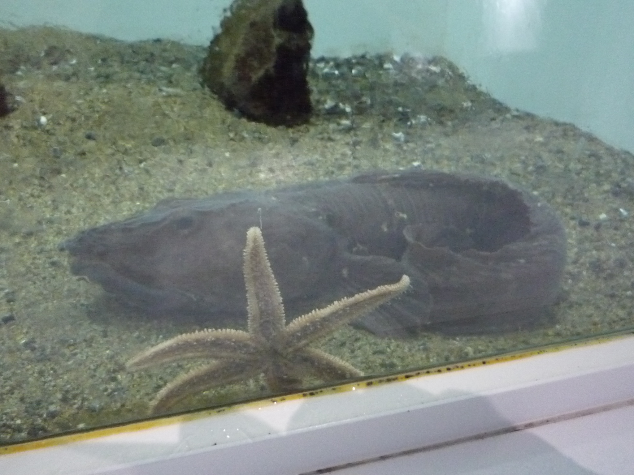 葛西臨海水族園にて